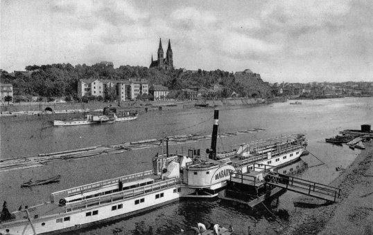 Dampfschiff Masaryk